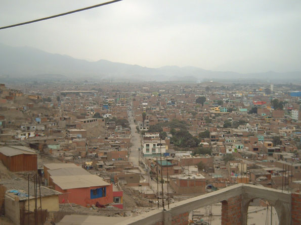 Vista panorámica del cercado de Puente Piedra